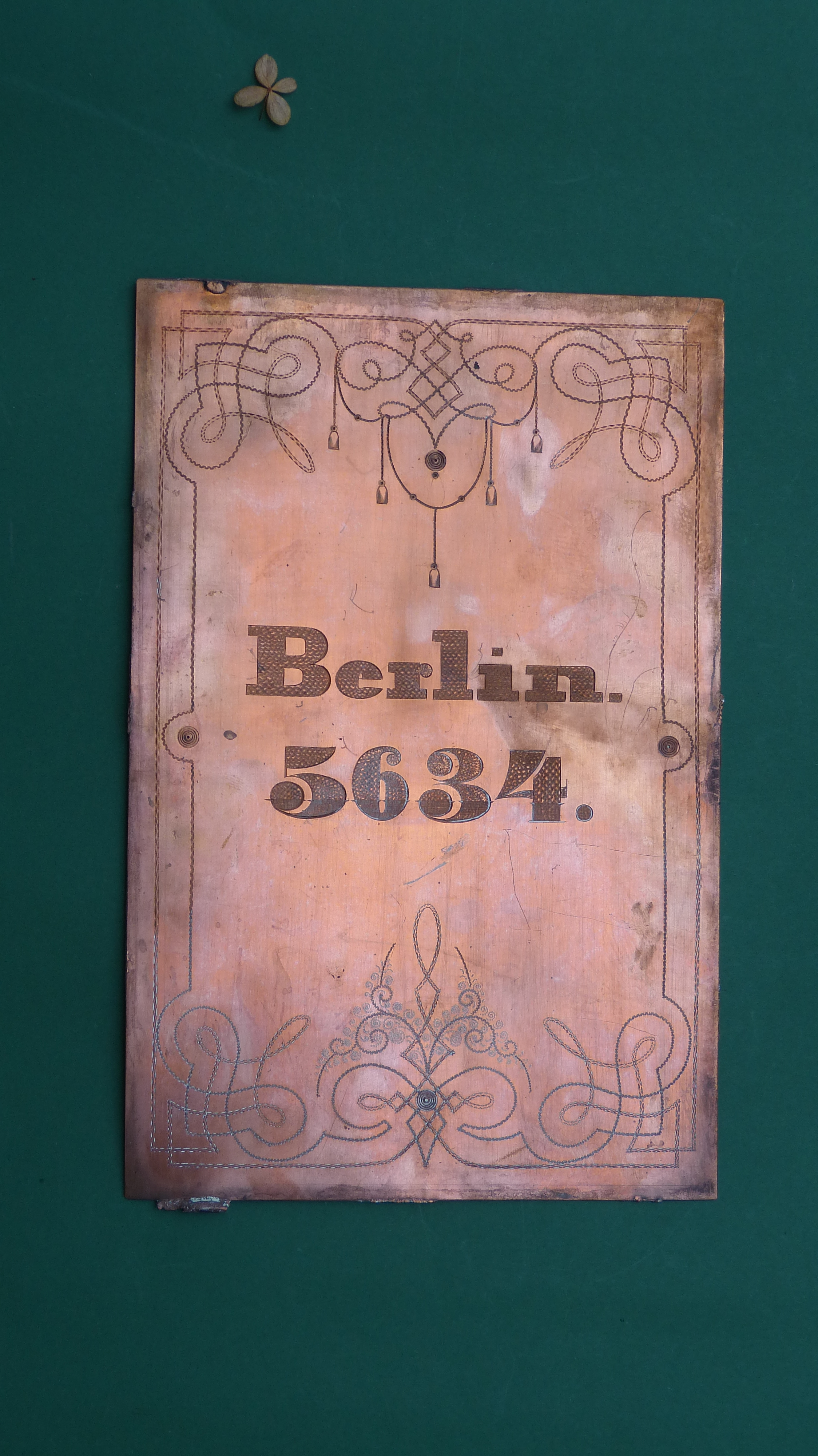 Messing graviert